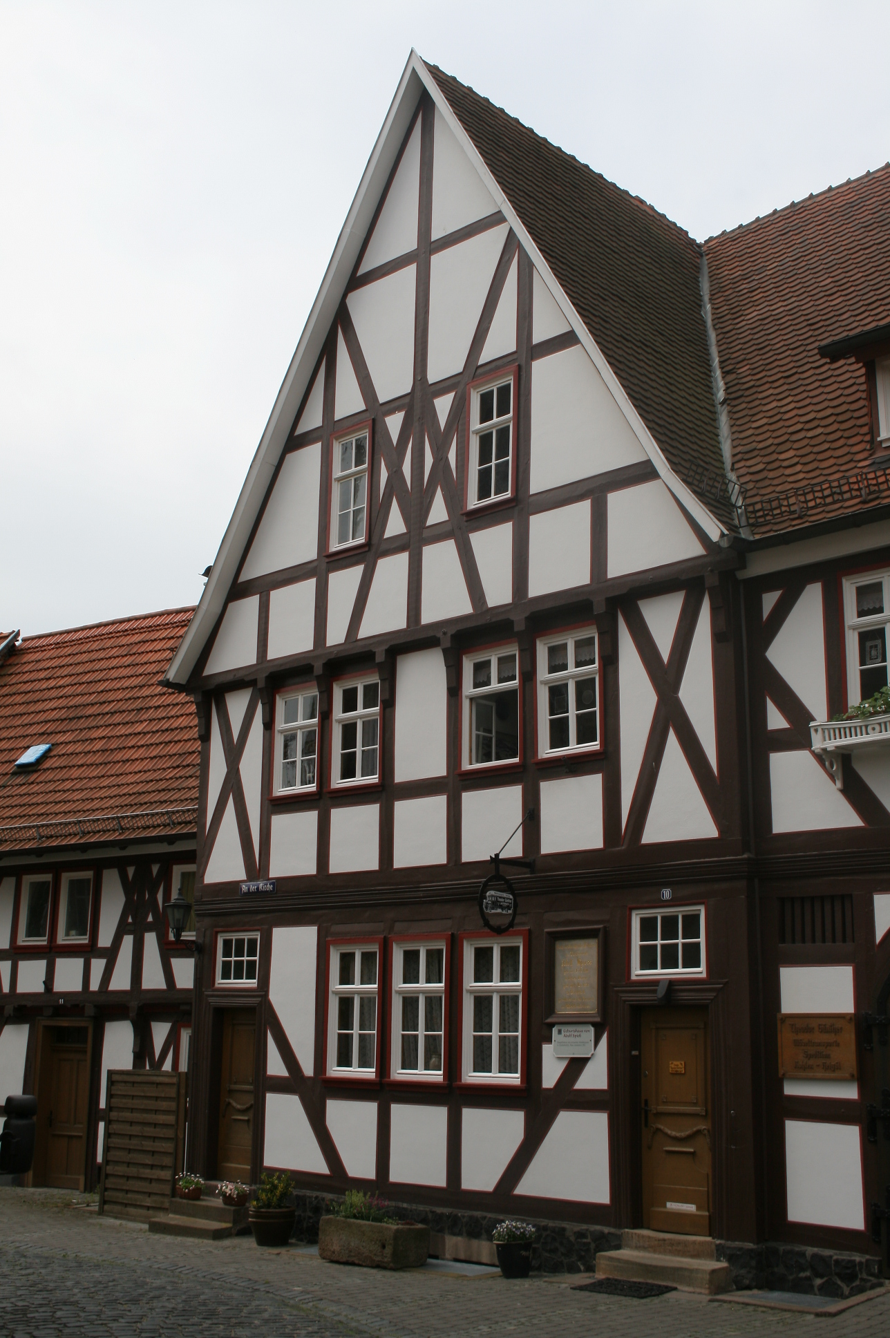 Geburtshaus von Adolf Spieß in Lauterbach (Hessen)